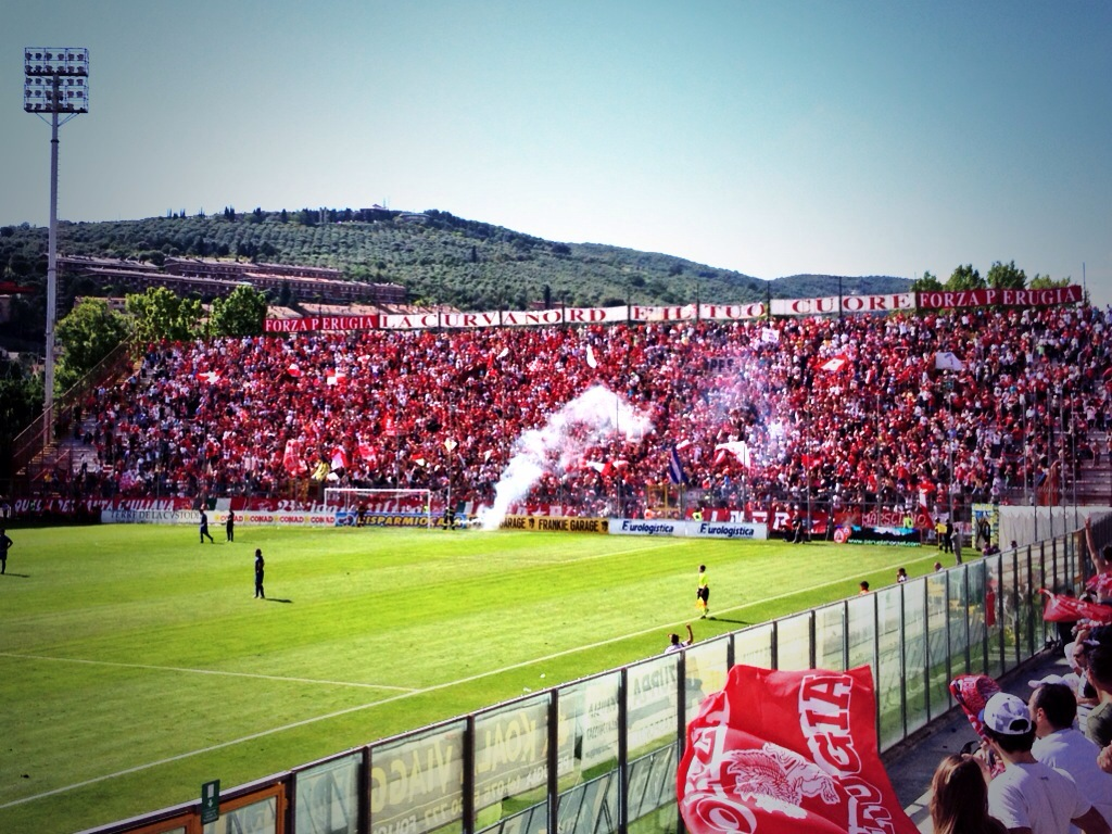 Curva Nord Renato Curi 2/06/2013